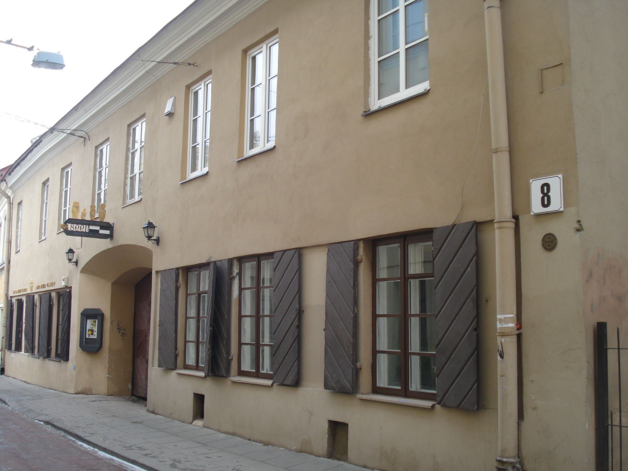 Улица Швянто Миколо 8. Фасад (Вильнюс)